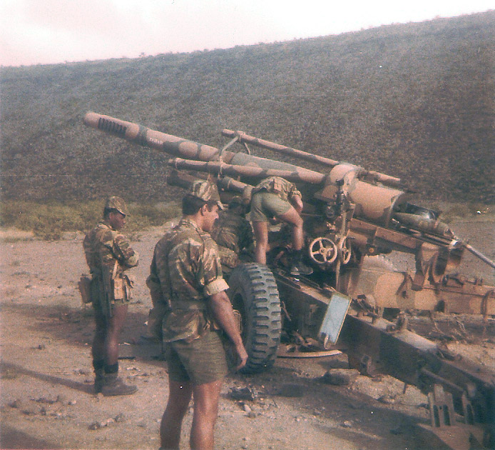 Description canon de 155 mm BF 50 du 6e R.A.Ma Djibouti 1979 libre de droits canon de 155 mm BF 50 du 6e R.A.Ma Djibouti 1979